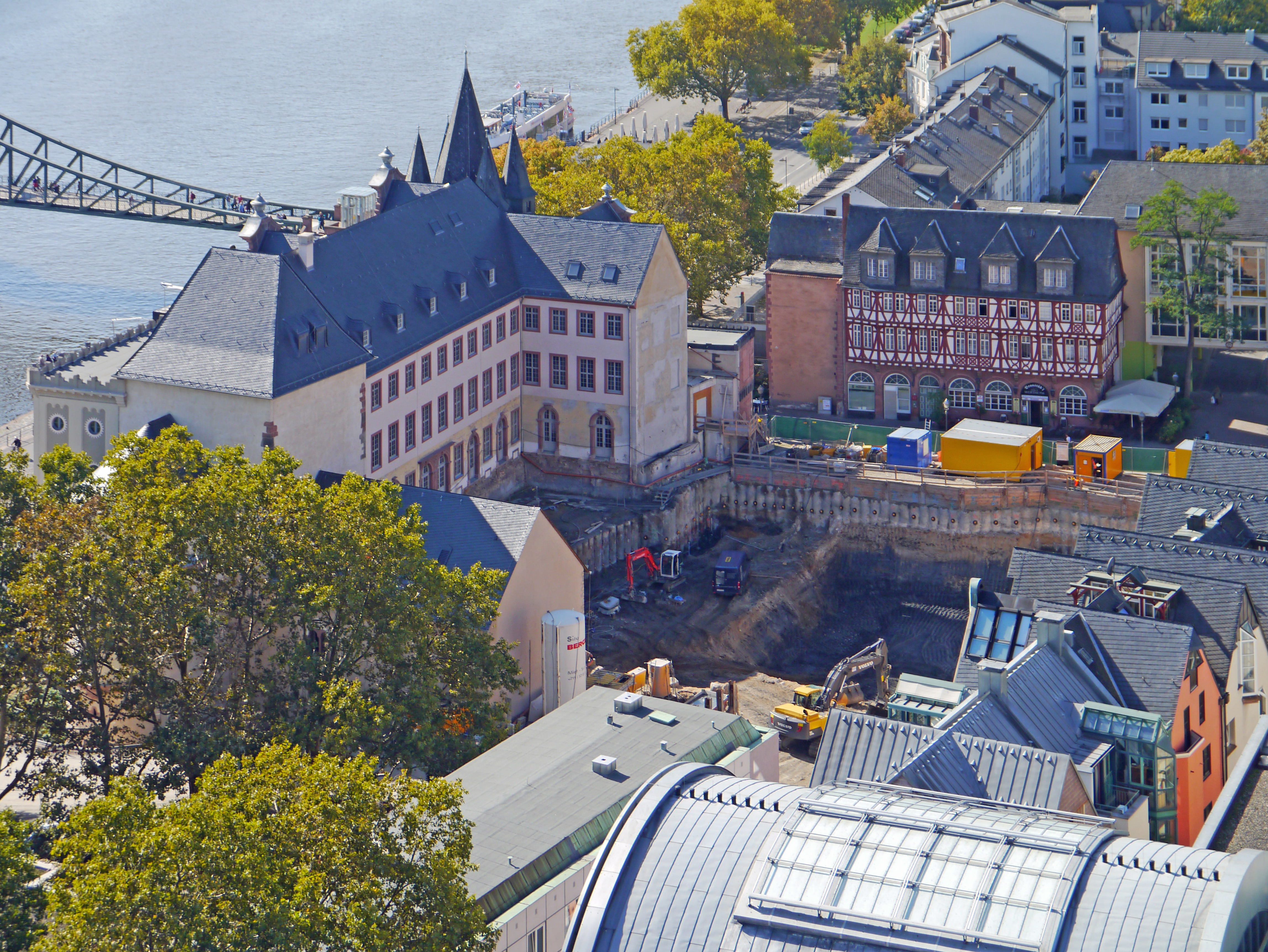 Bauplatz des Historischen Museums. 2012, in Frankfurt am Main. Blick vom Kaiserdom St. Bartholomäus.